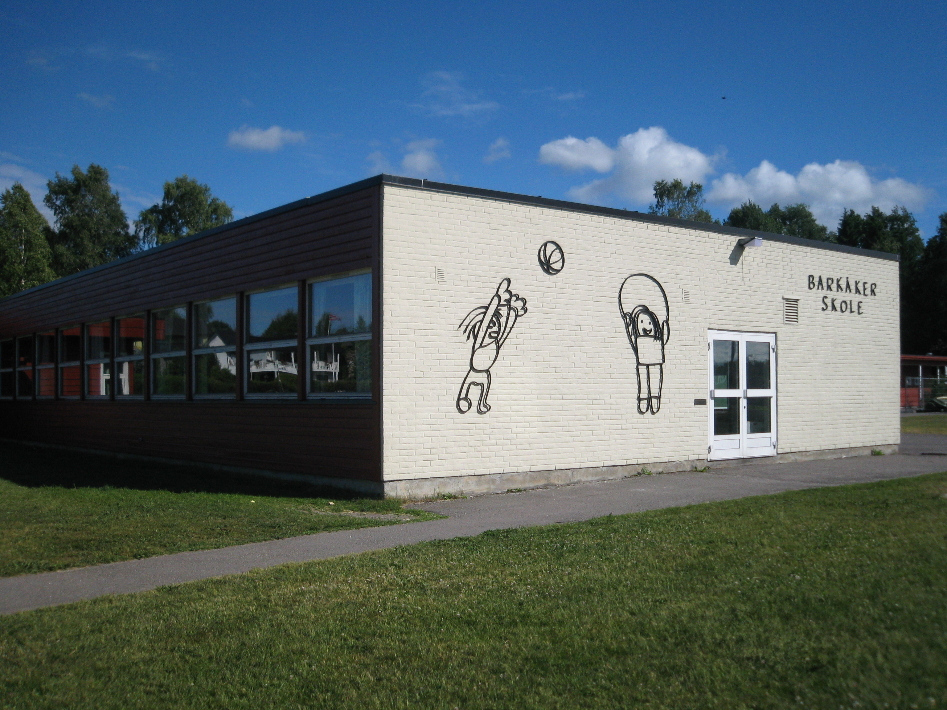 Barkåker skole - skolens logo